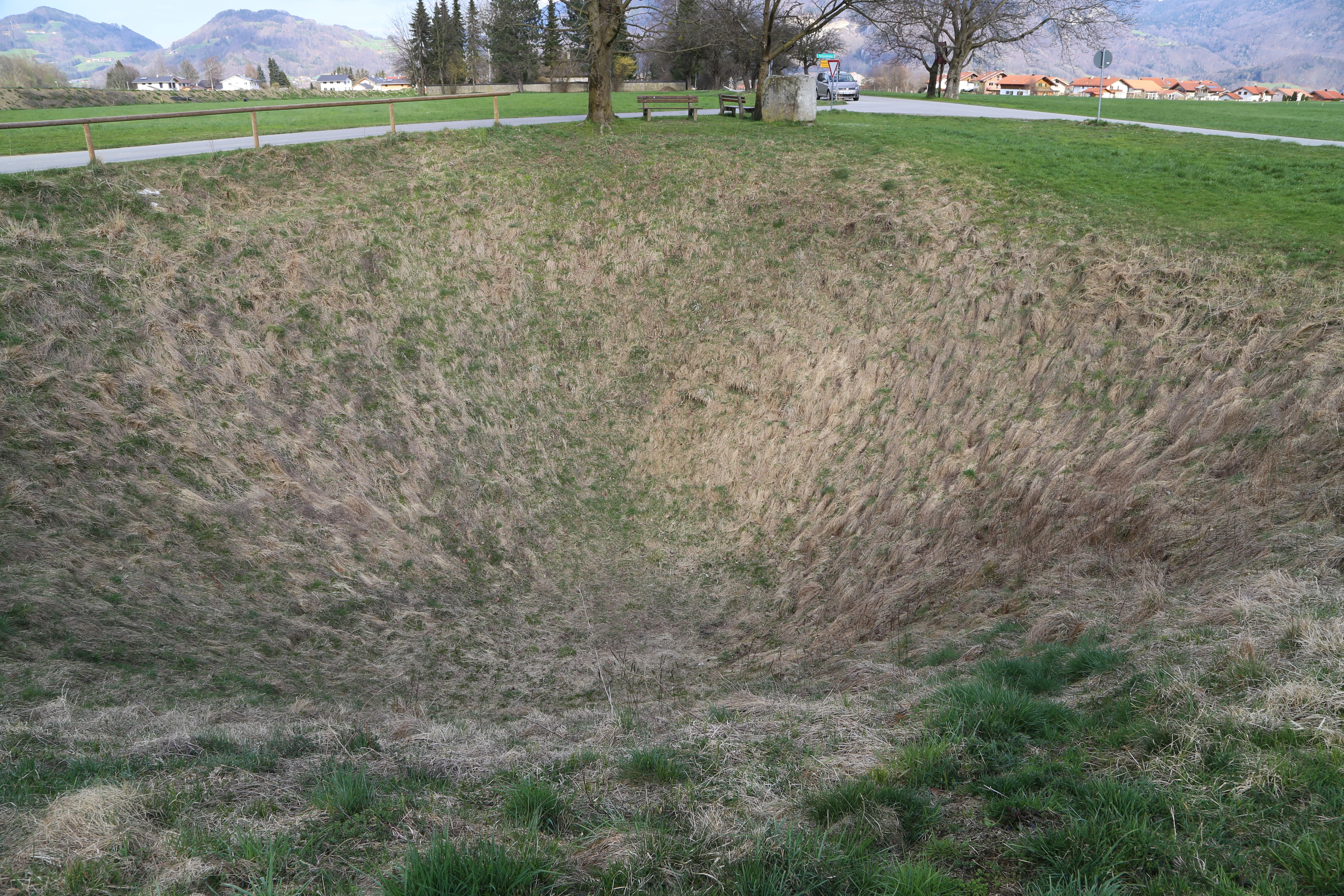 Doline Wolfsgrube bei Flintsbach am Inn, Geotop-Nummer: 187R002